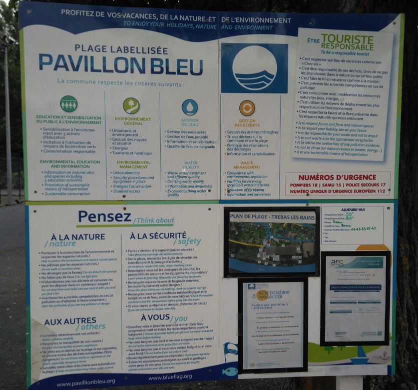 Photographie d'un panneau d'informations Pavillon Bleu